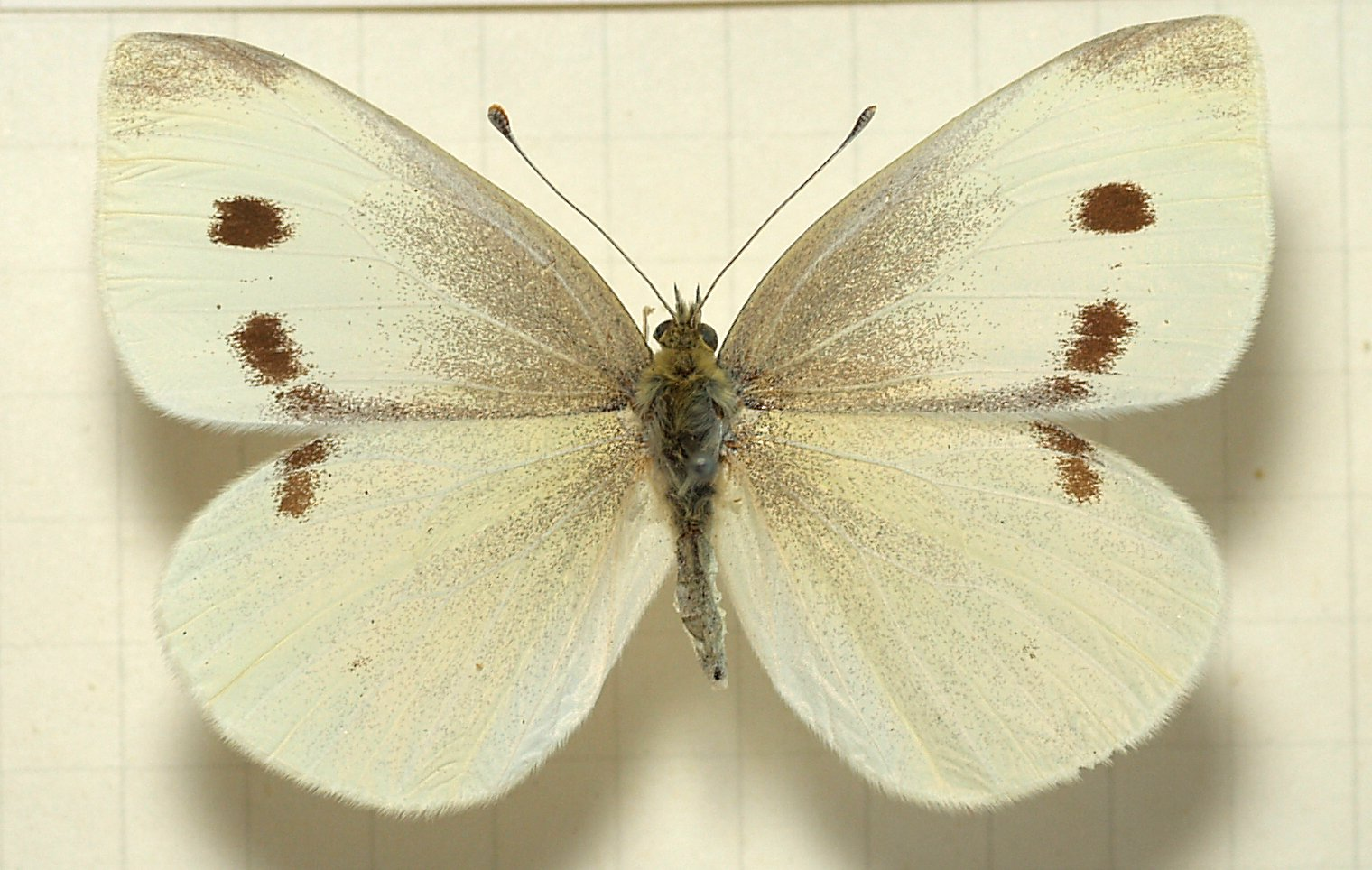 Pieris rapae